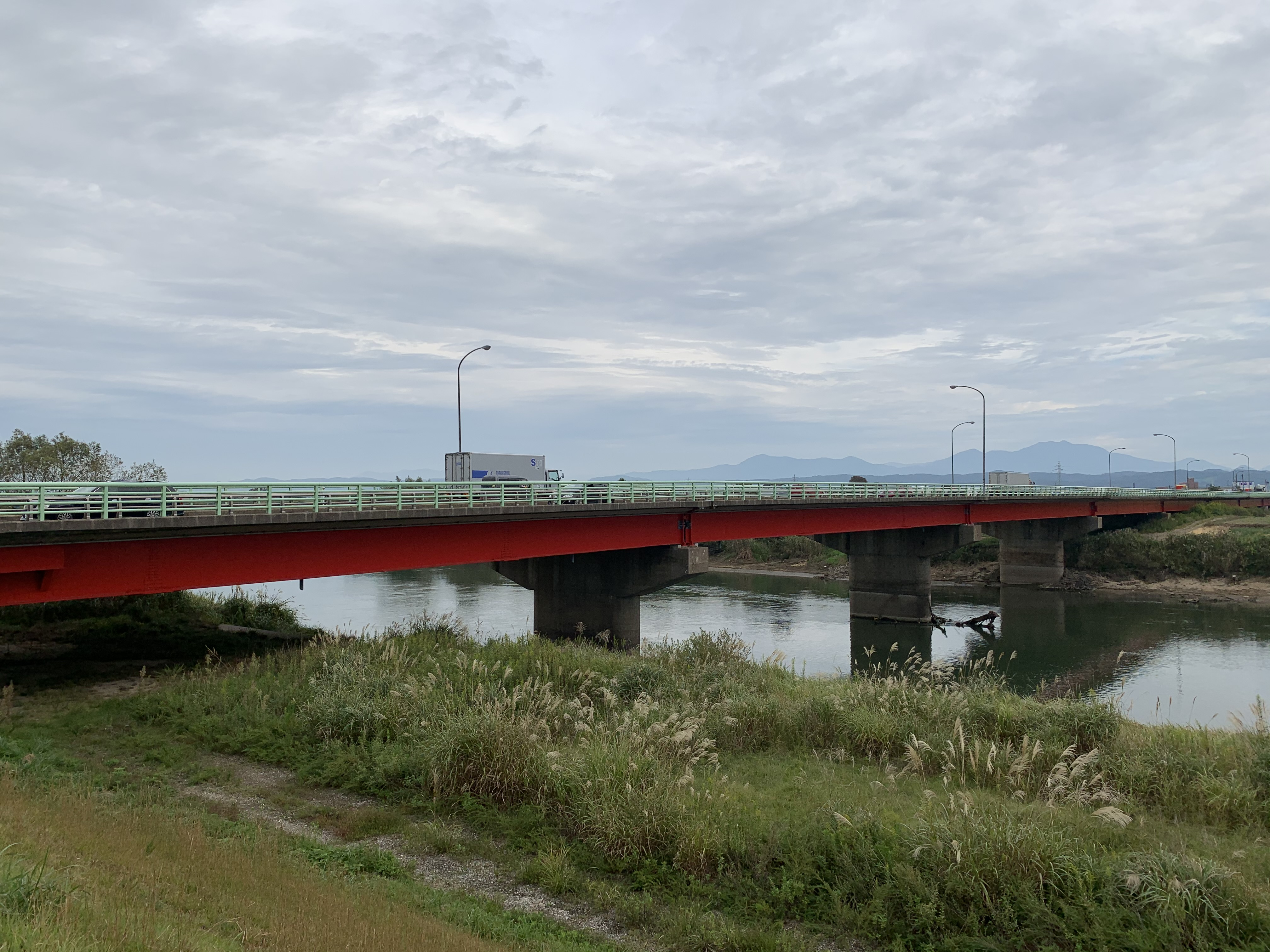 信濃川にかかる石上大橋（左岸から撮影）